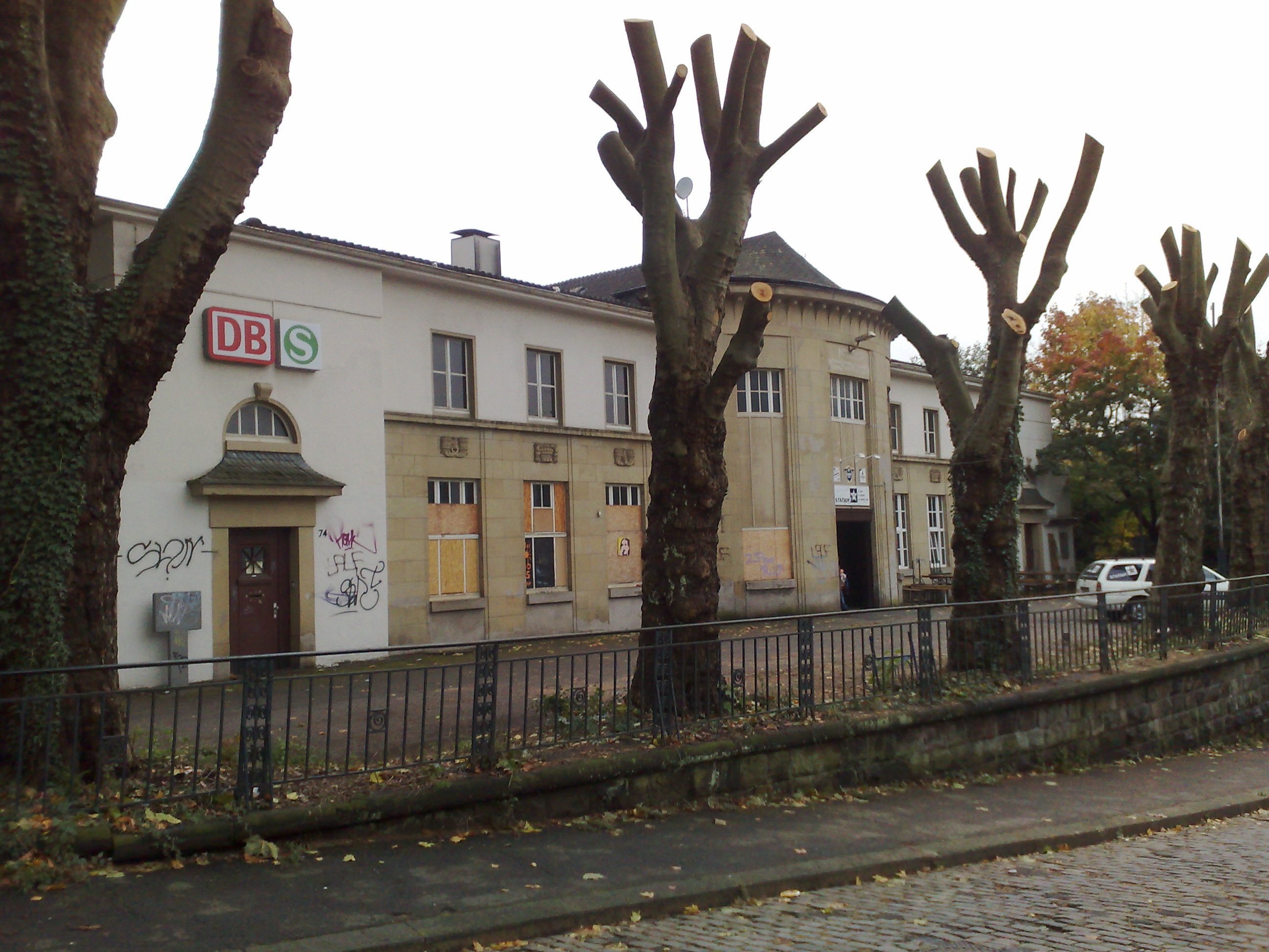 Bahnhof Unterbarmen in Wuppertal